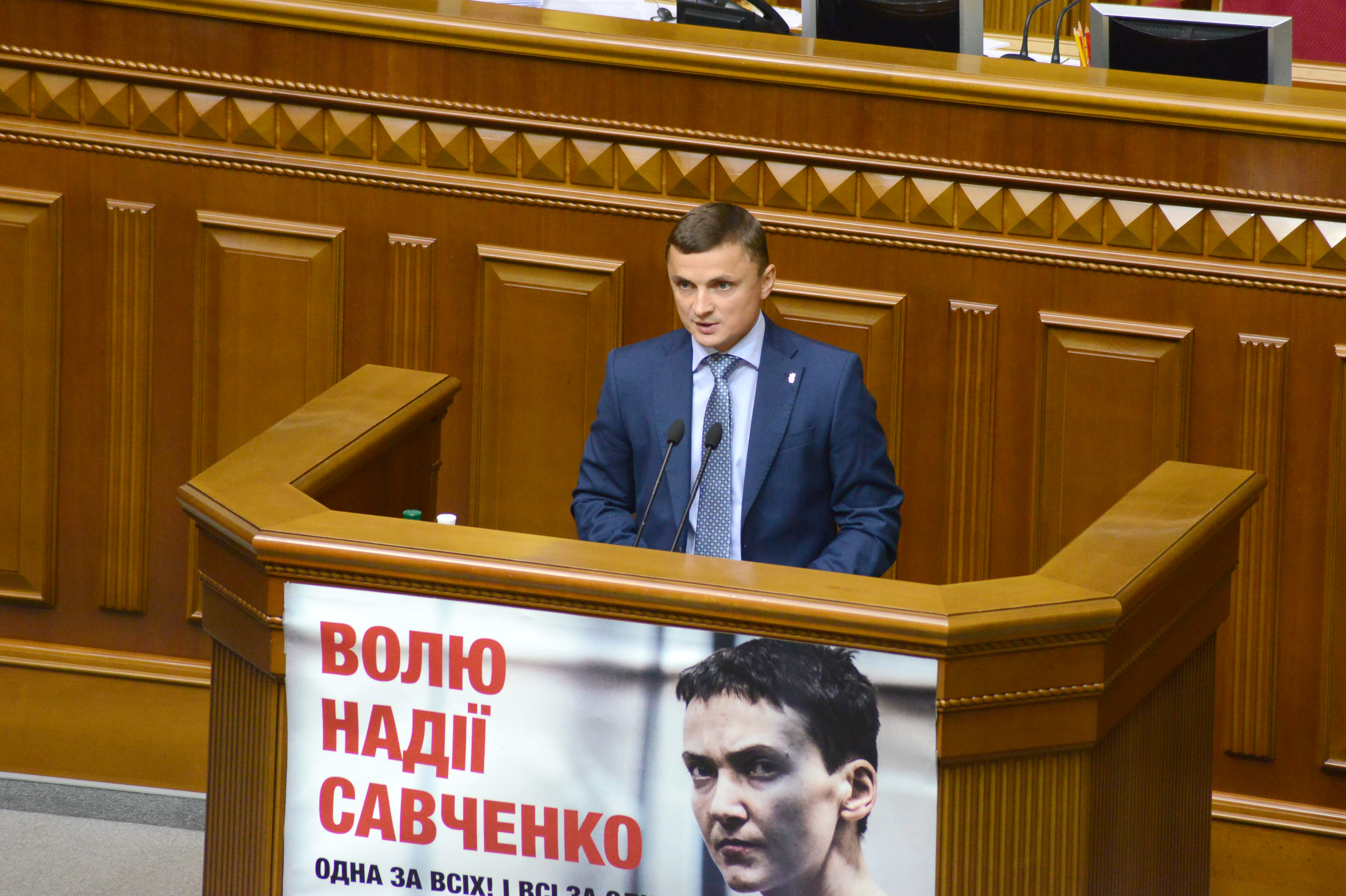 ВЕРХОВНА РАДА УКРАЇНИ 2015 фотограф Вадим Чуприна